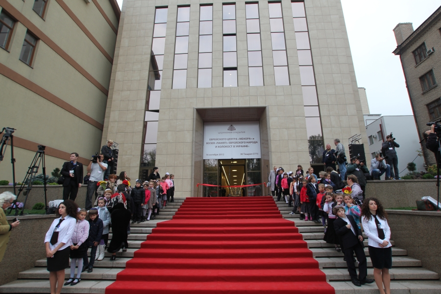 Открытие центра «Менора», ул. Шолом-Алейхема 4/26, г. Днепр, Днепропетровская область, Украина